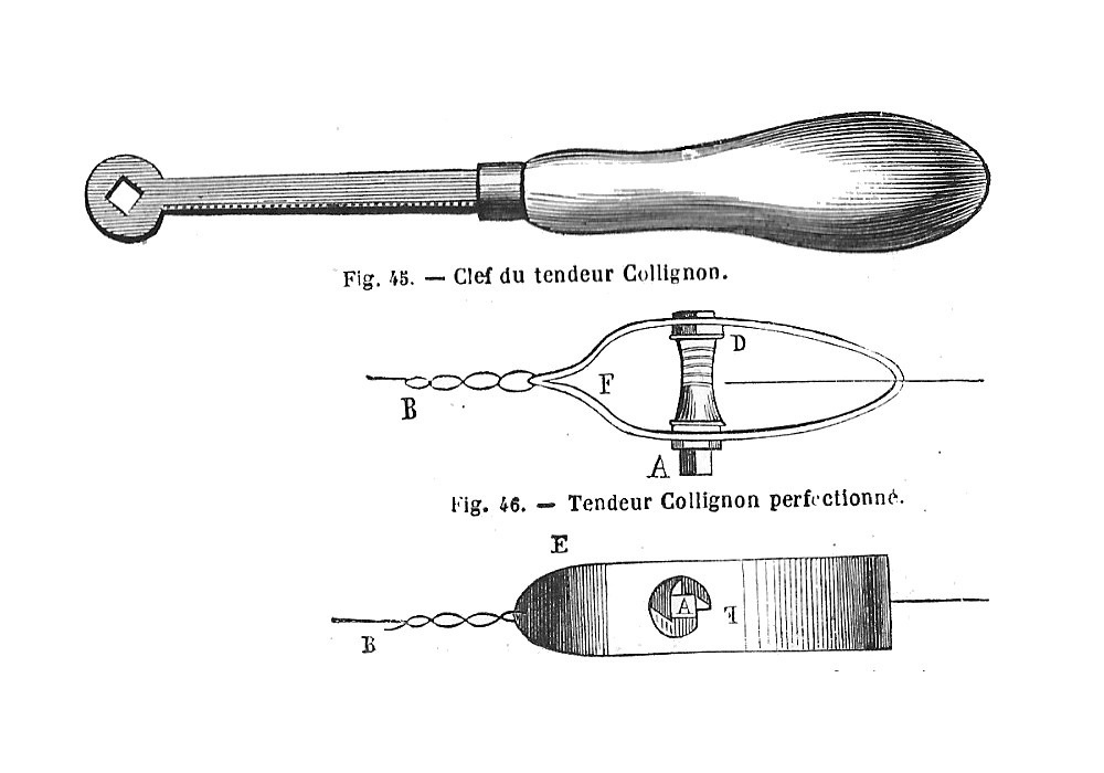 Tendeur de fil de fer Collignon